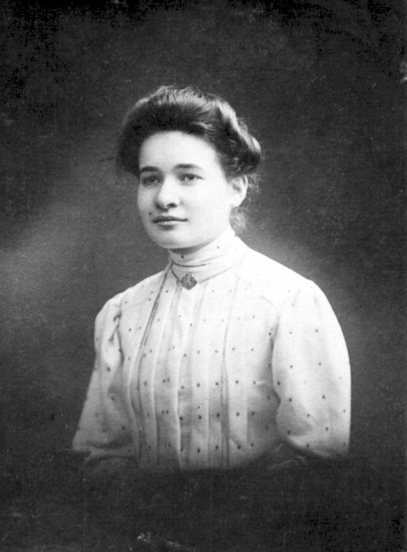 Sofia Zamenhof ok. 1906 r.